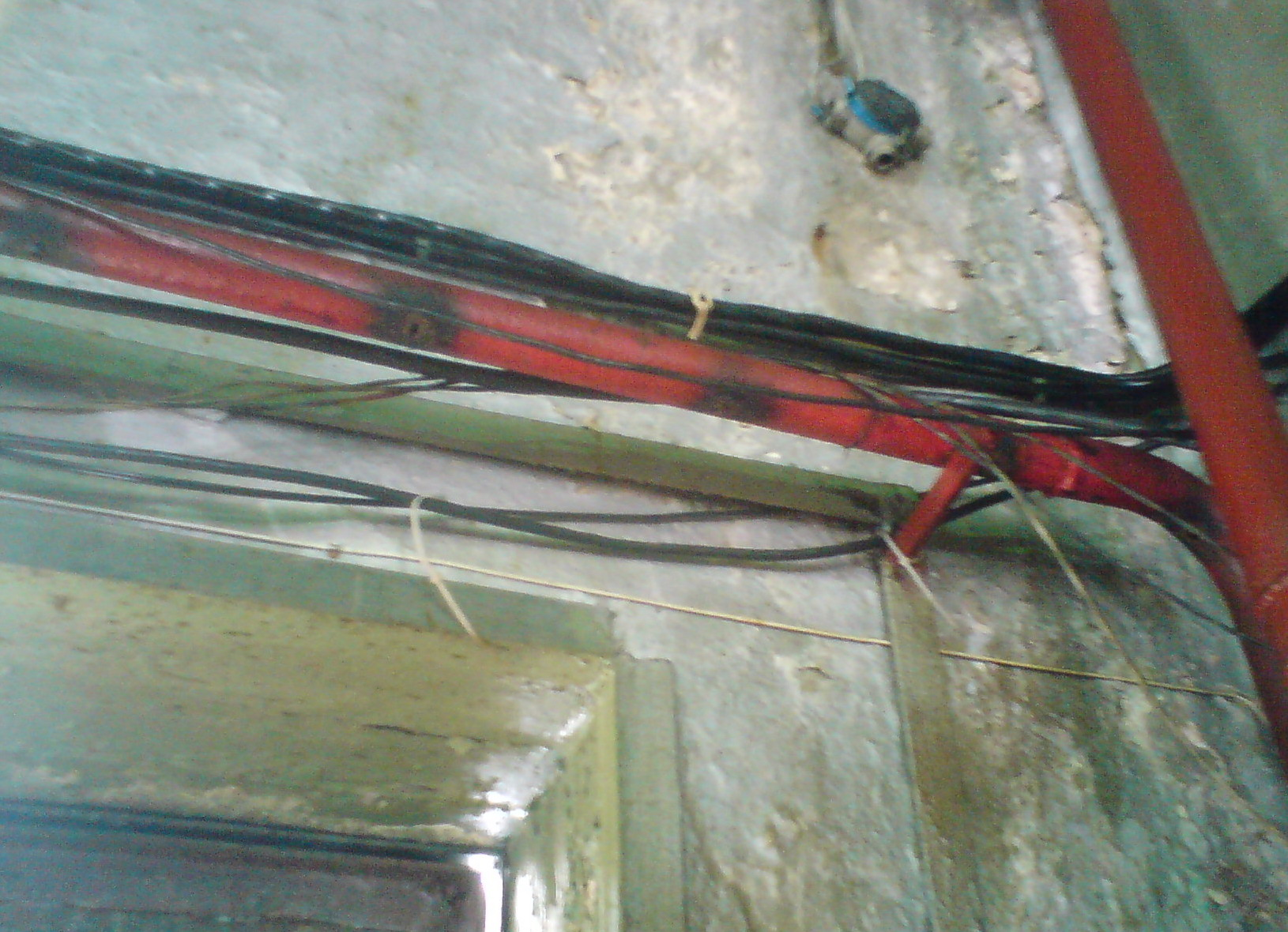 Дренчер системы паротушения